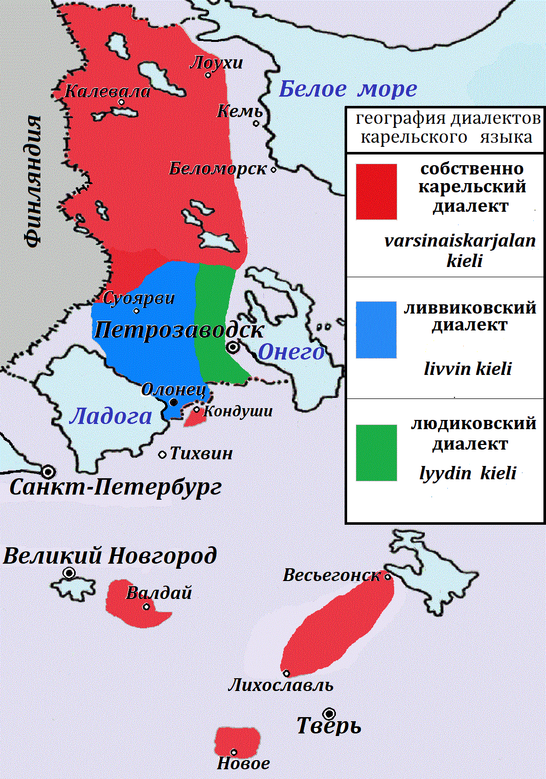 География распространения карельского языка в России.